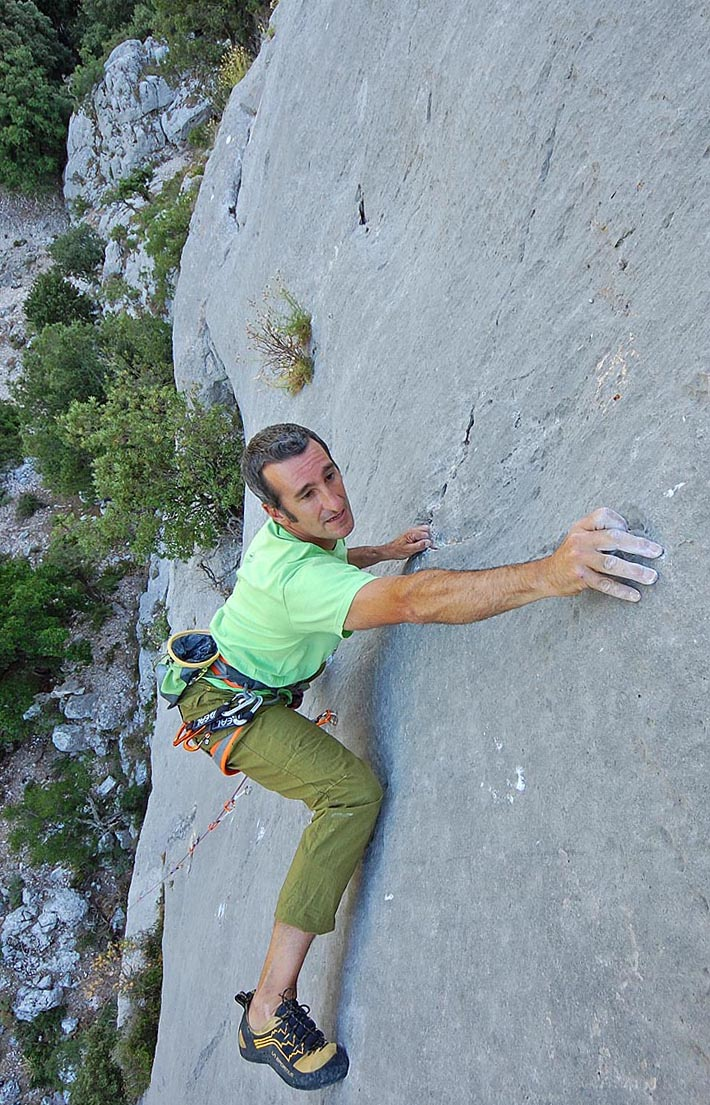 Maurizio Oviglia nel 2010 su Hacicko (8b) a Serra Oseli, la sua via sportiva più difficile